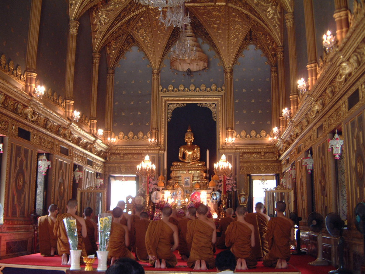 Wat Ratchabopit (วัดราชบพิธสถิตมหาสีมารามราชวรวิหาร), Bangkok, Thailand